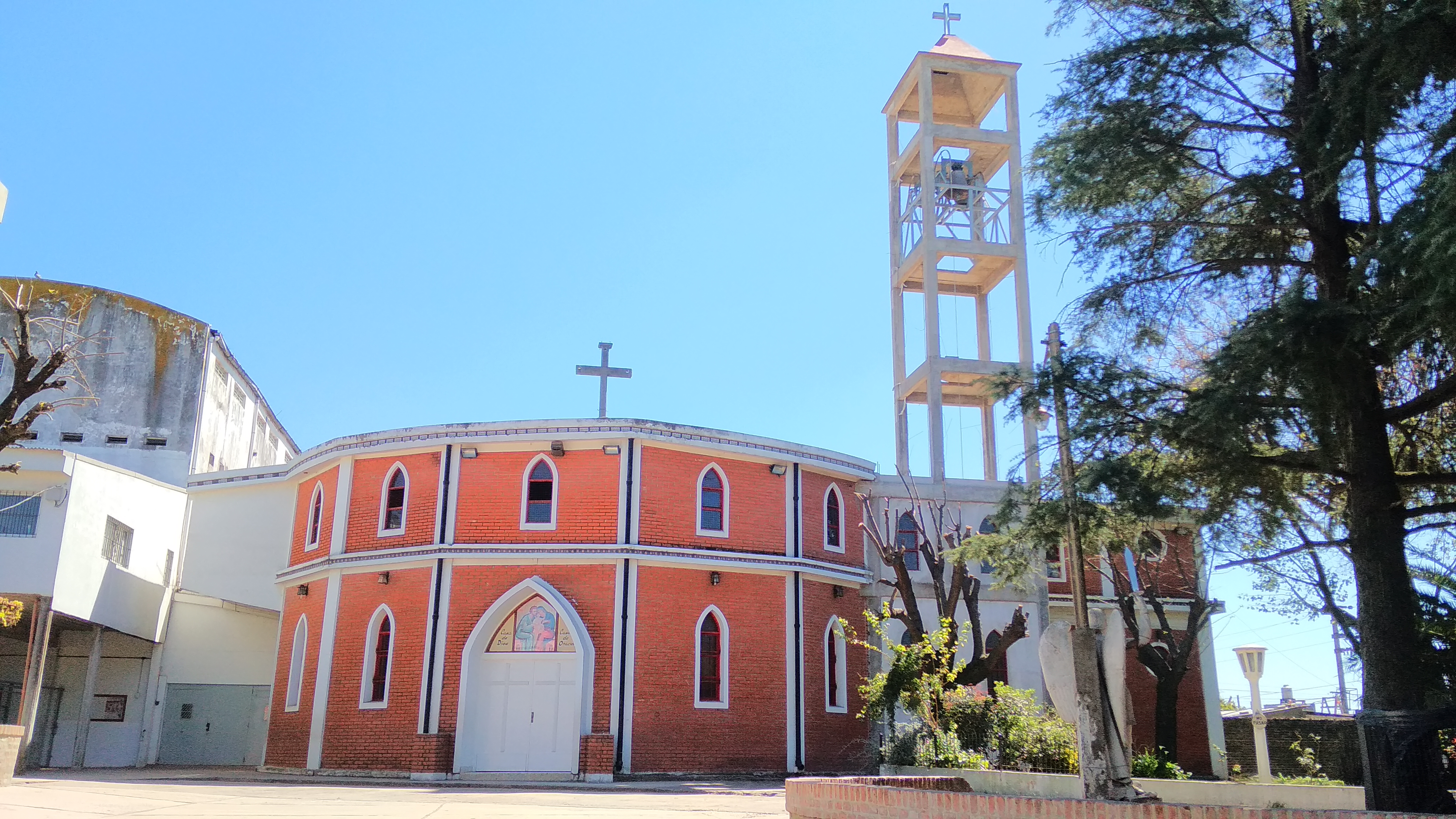 La Parroquia de San Cayetano es la única con campanario (en construcción) en la Diócesis de Laferrere